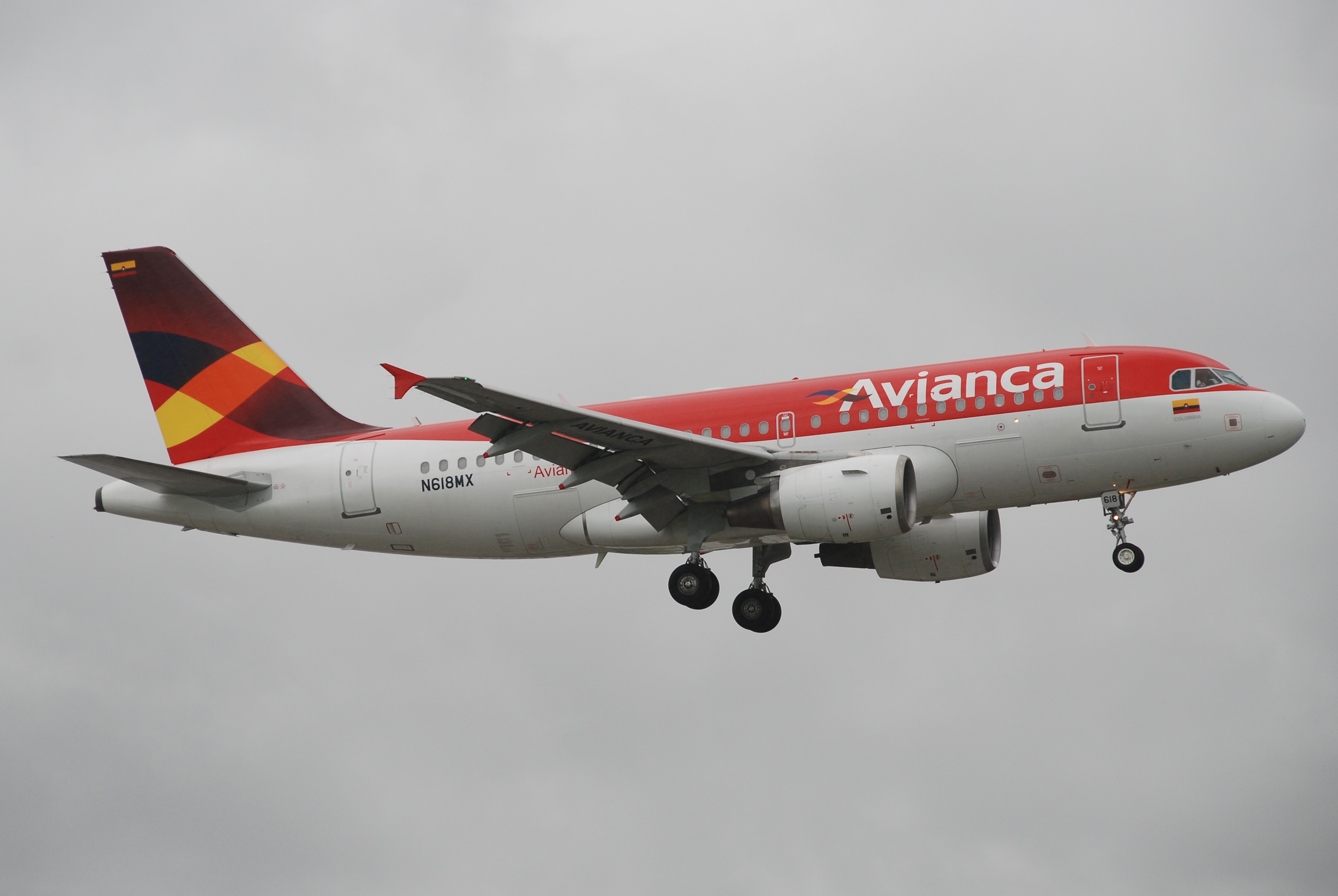 AVIANCA Airbus A319-112; N618MX@MIA;17.10.2011/626iq